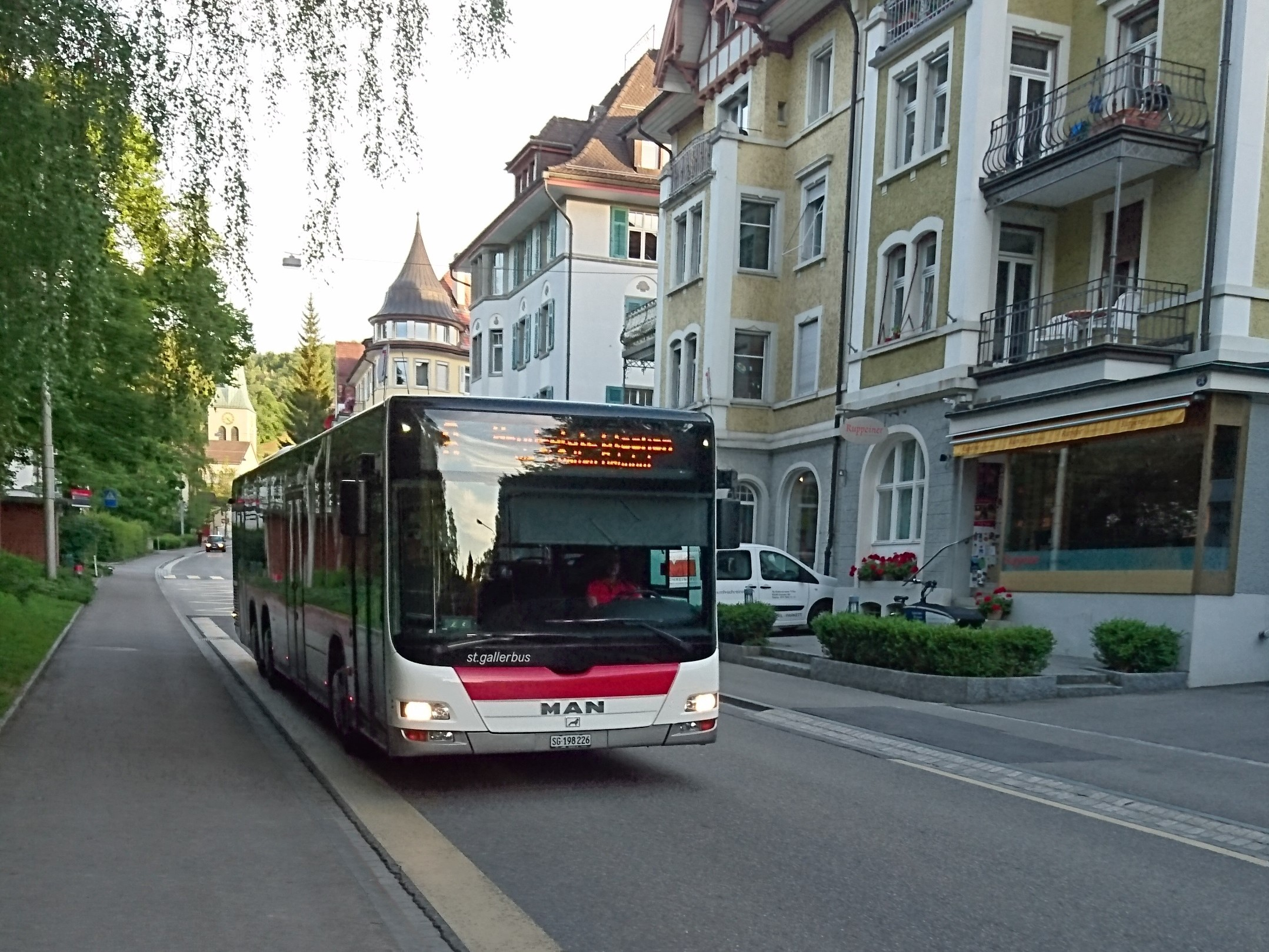 Autobus der Marke MAN der St. Galler Verkehrsbetriebe (VBSG) in St. Georgen, St. Gallen